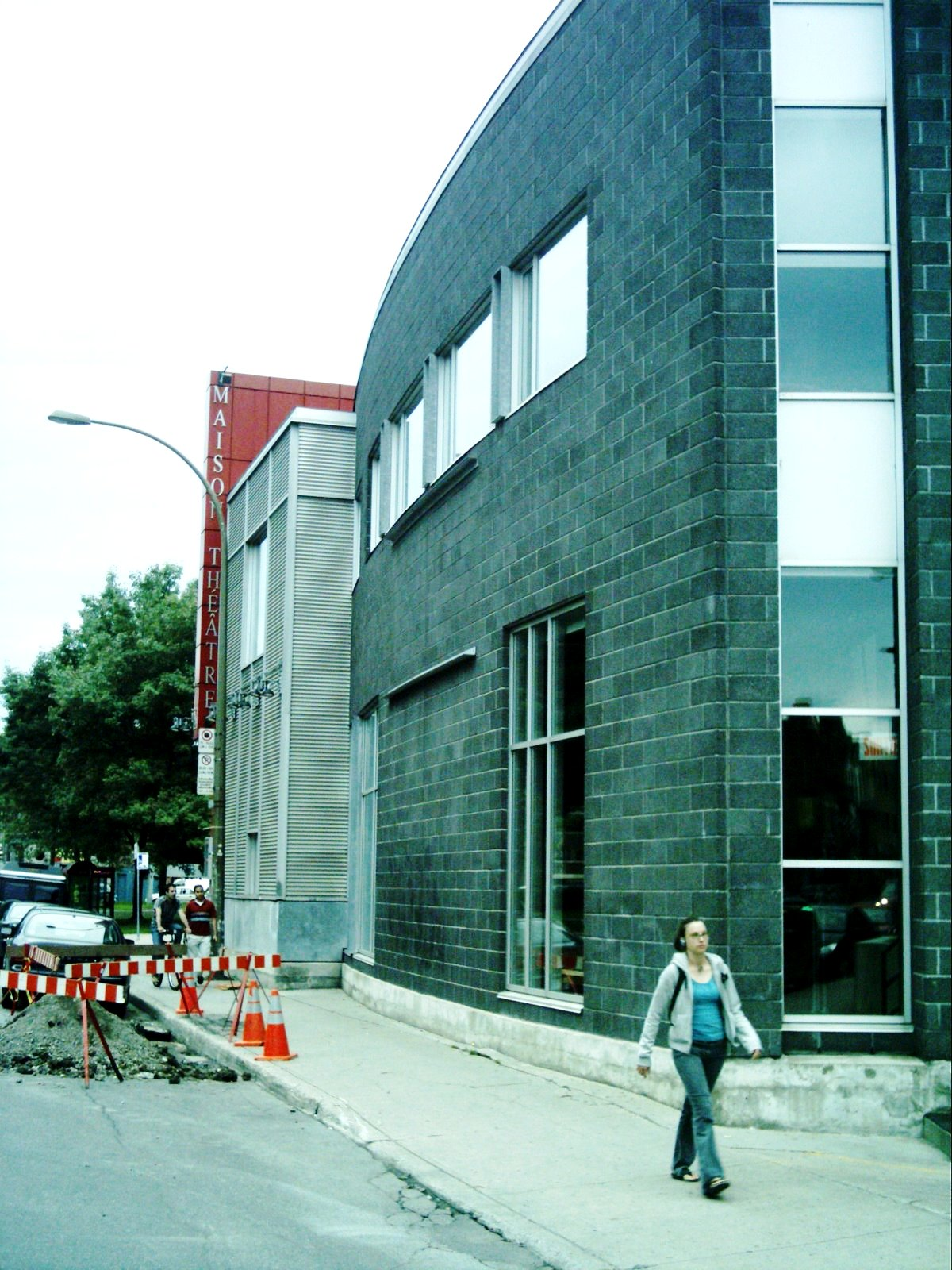 La Maison Théâtre est situé sur la rue Ontario Est près de la rue Saint-Denis